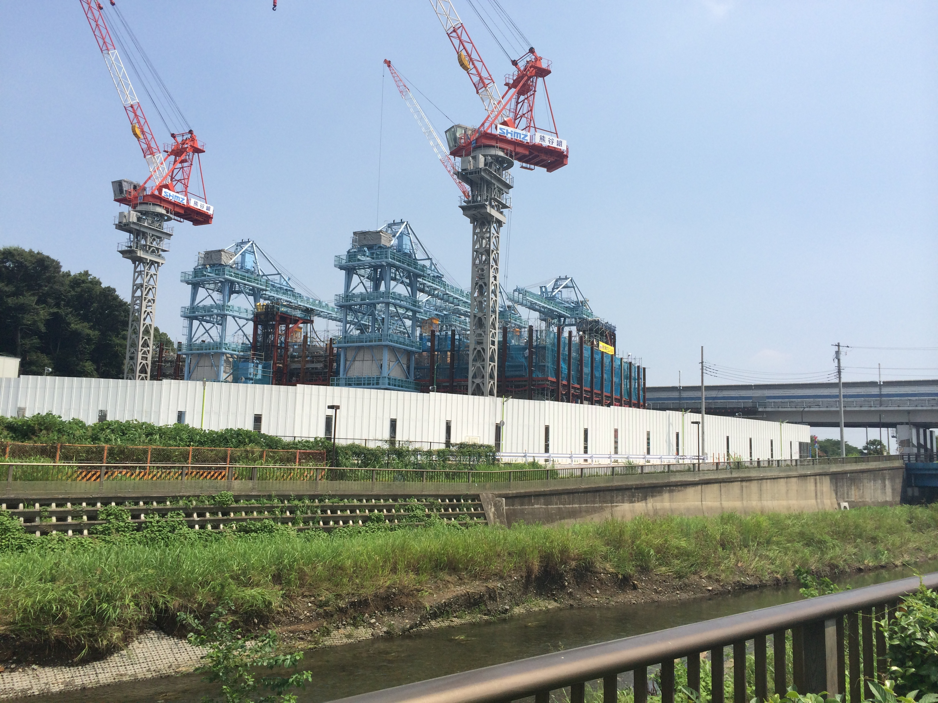 東京外環トンネル（仮称）シールド立坑工事現場・東名ジャンクション（仮称）予定地（2014年7月撮影）。手前が野川、右手奥が東名高速道路本線。